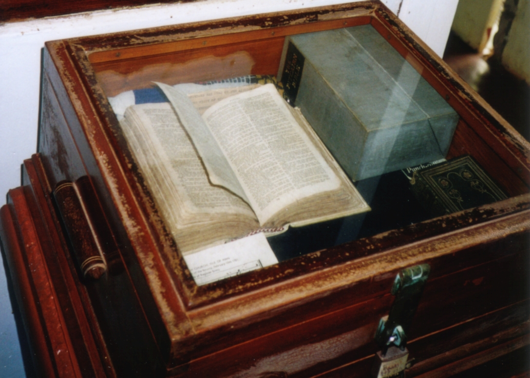 Bibel der Bounty in der Kirche von Adamstown (Pitcairn)